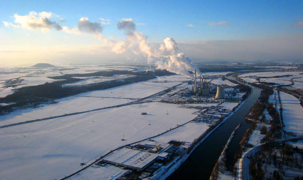 Tok Labe u Křivenic s Elektrárnou Mělník a horou Říp v pozadí.